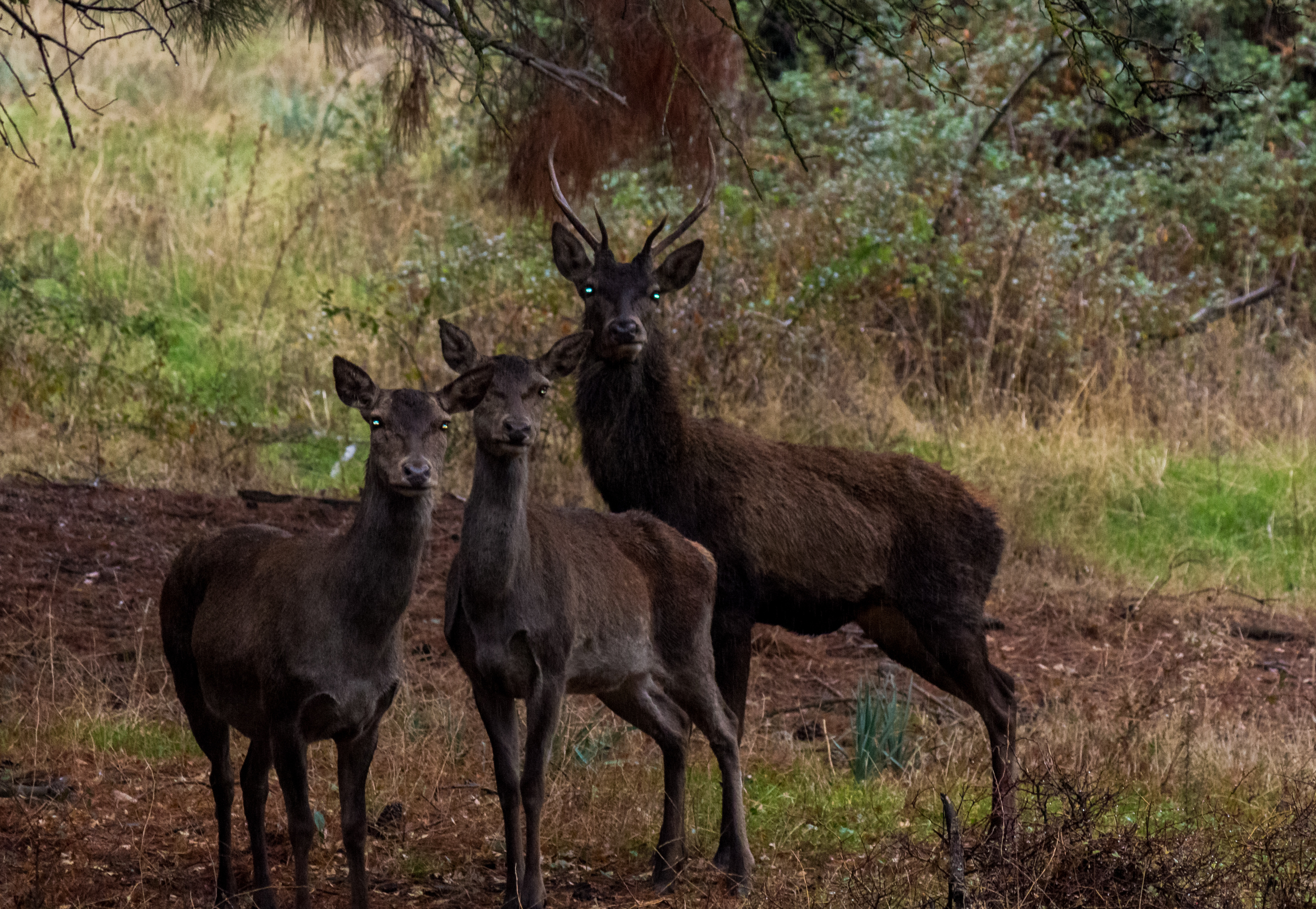 Cerf de barbarie. Ce cerf est au bord de l'extinction est le seul représantant de Cervidae en Afrique.